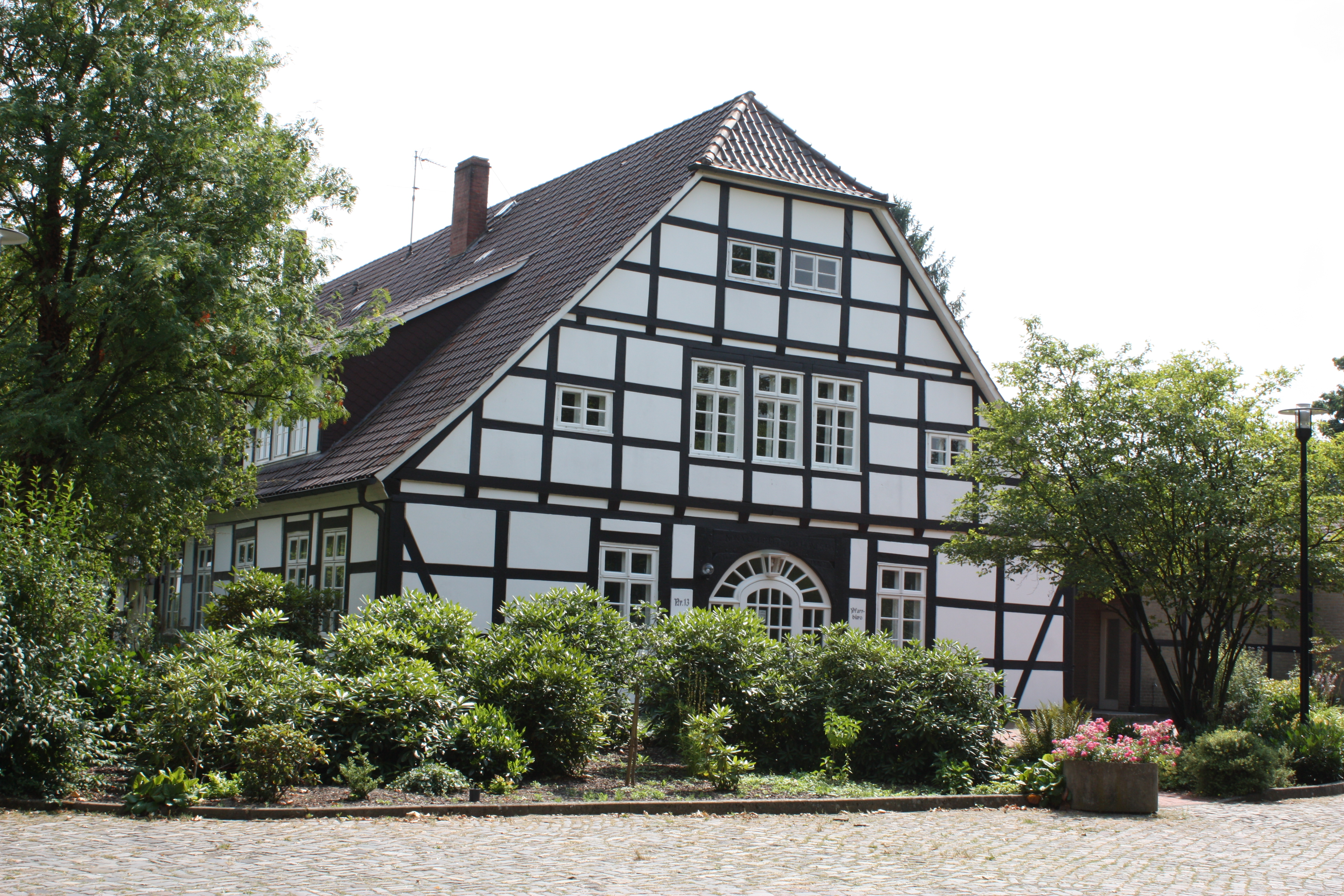 Barnstorf, Landkreis Diepholz, Niedersachsen